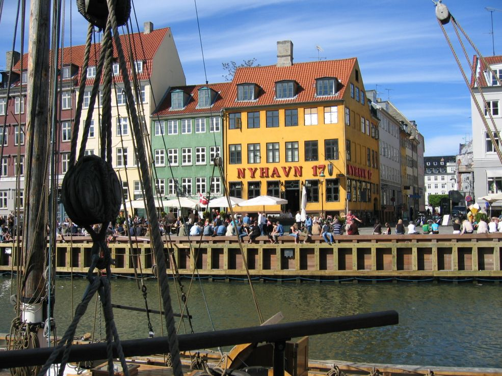 Nyhavn, le port branché de Copenhague.